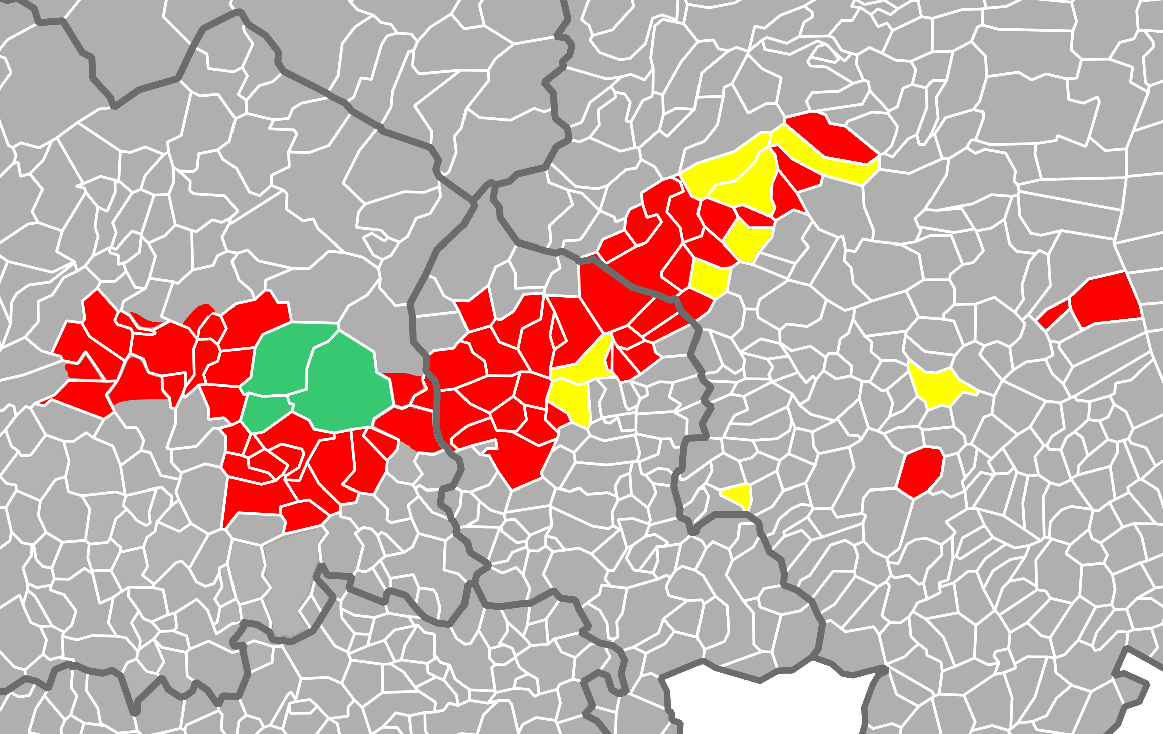 Carte des gisements identifiés du bassin houiller stéphanien sous-vosgiens.